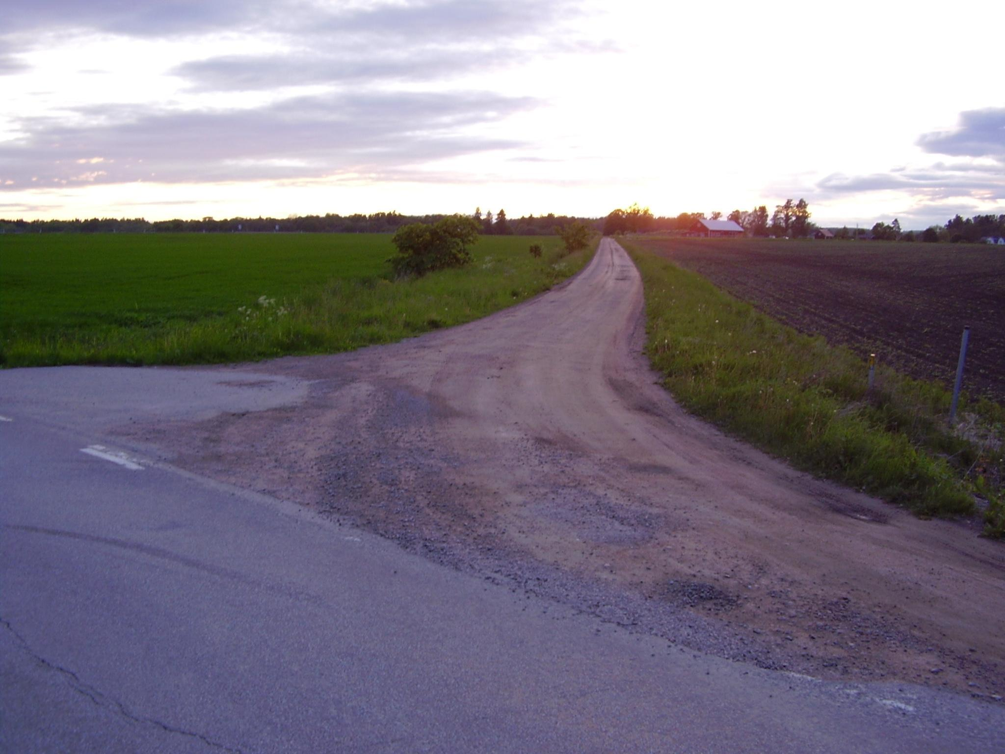 Bild från Bränninge. Där denna lilla väg går idag gick fordom MÖJ. Fotot taget av Lavas 2005.